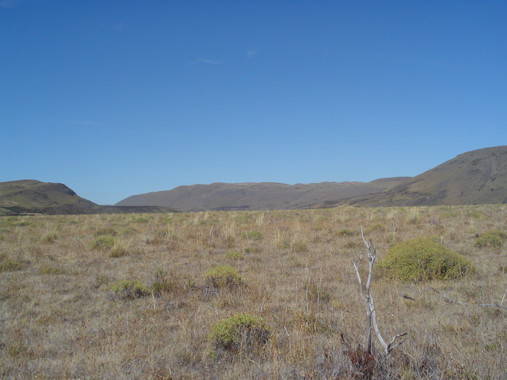 Steppe de Patagonie, secteur nord est du parc Torres del Paine, Chili